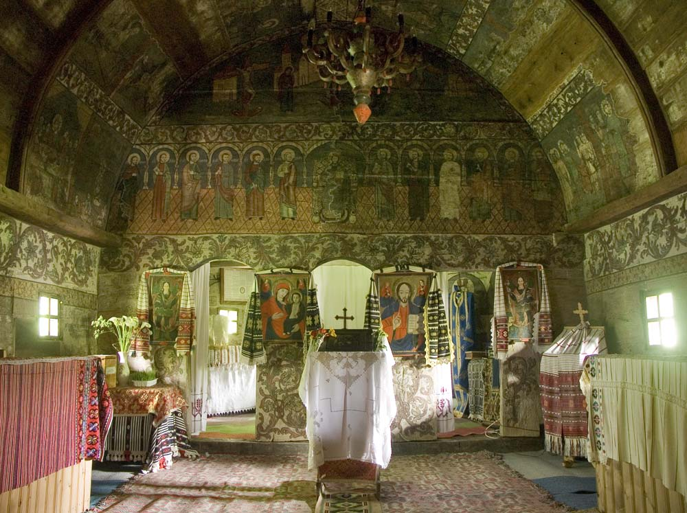 Biserica de lemn din Bezded, interiorul navei.